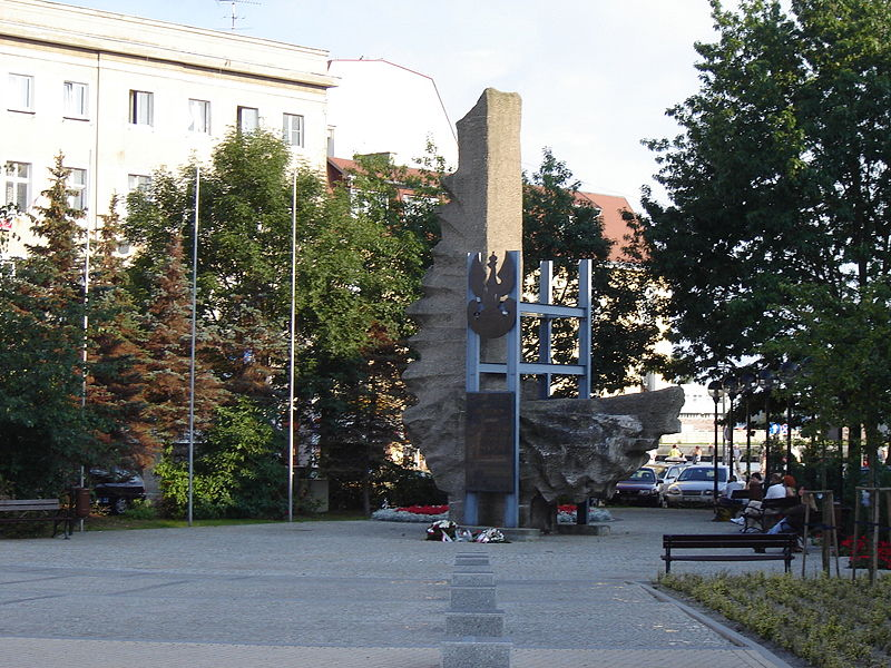 Pomnik Bohaterów Walki o Niepodległość RP w Świnoujściu.